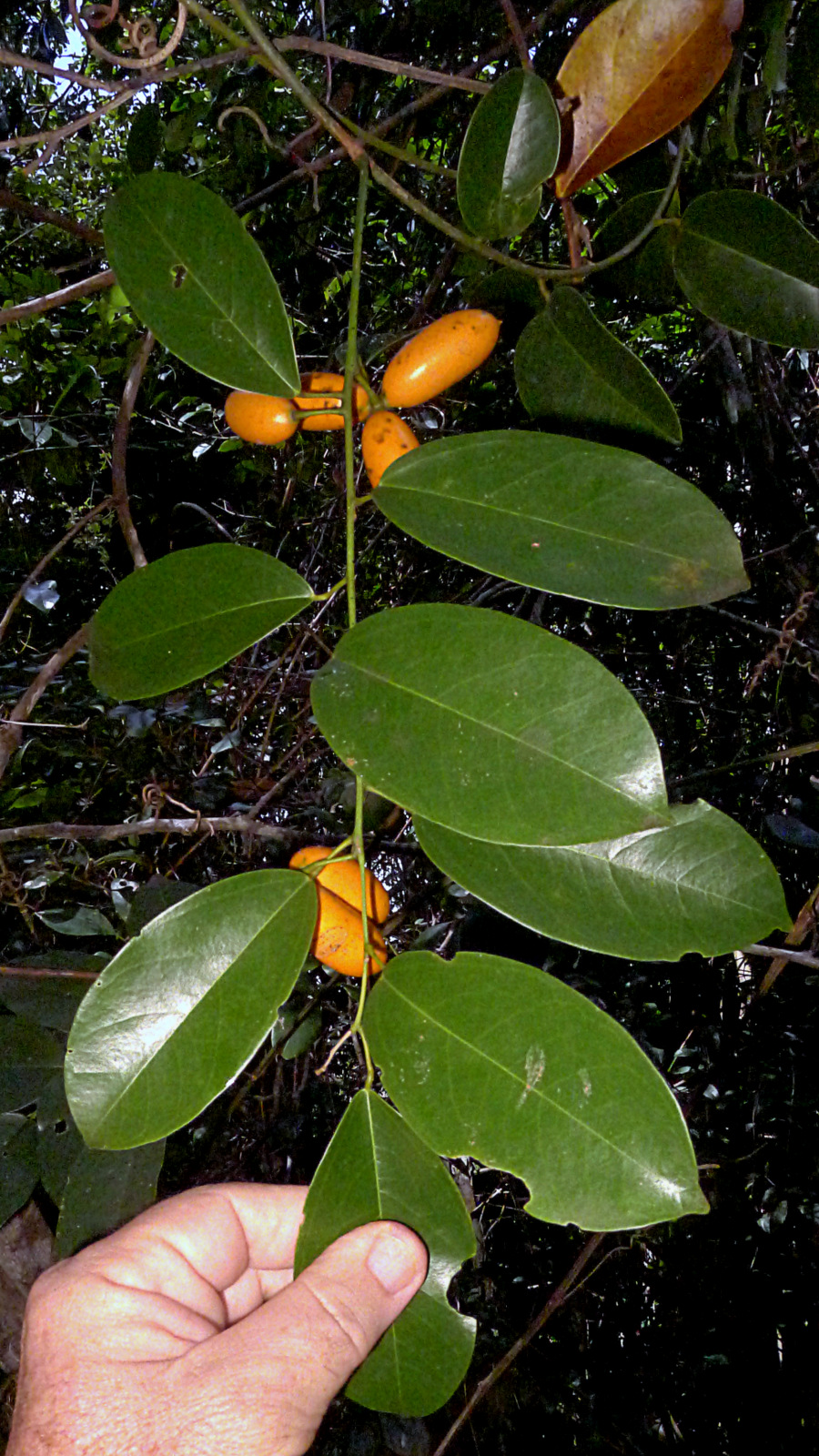 Orthomene schomburgkii (Miers) Barneby